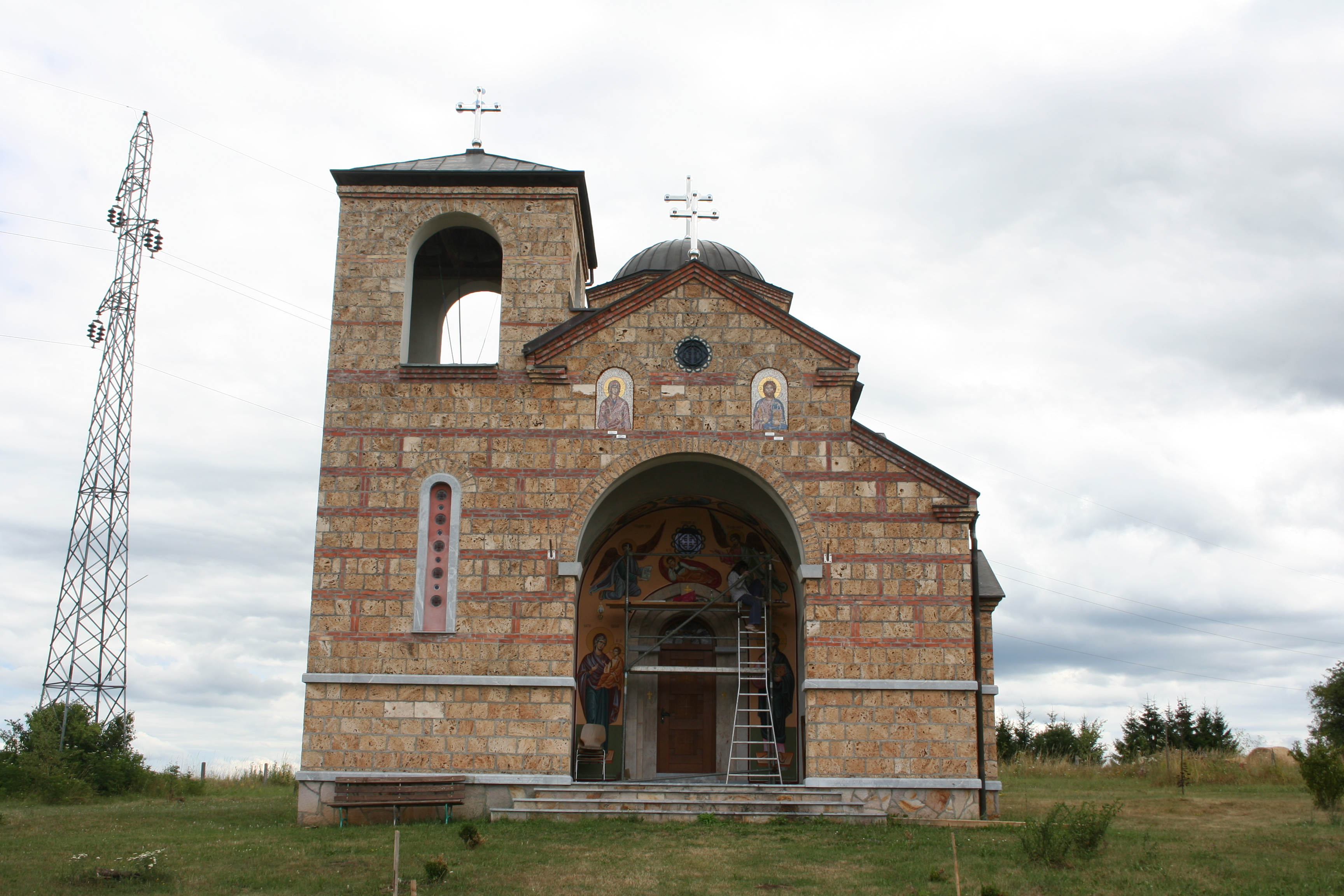 Crkva Sv. Marine u Krivoj Reci